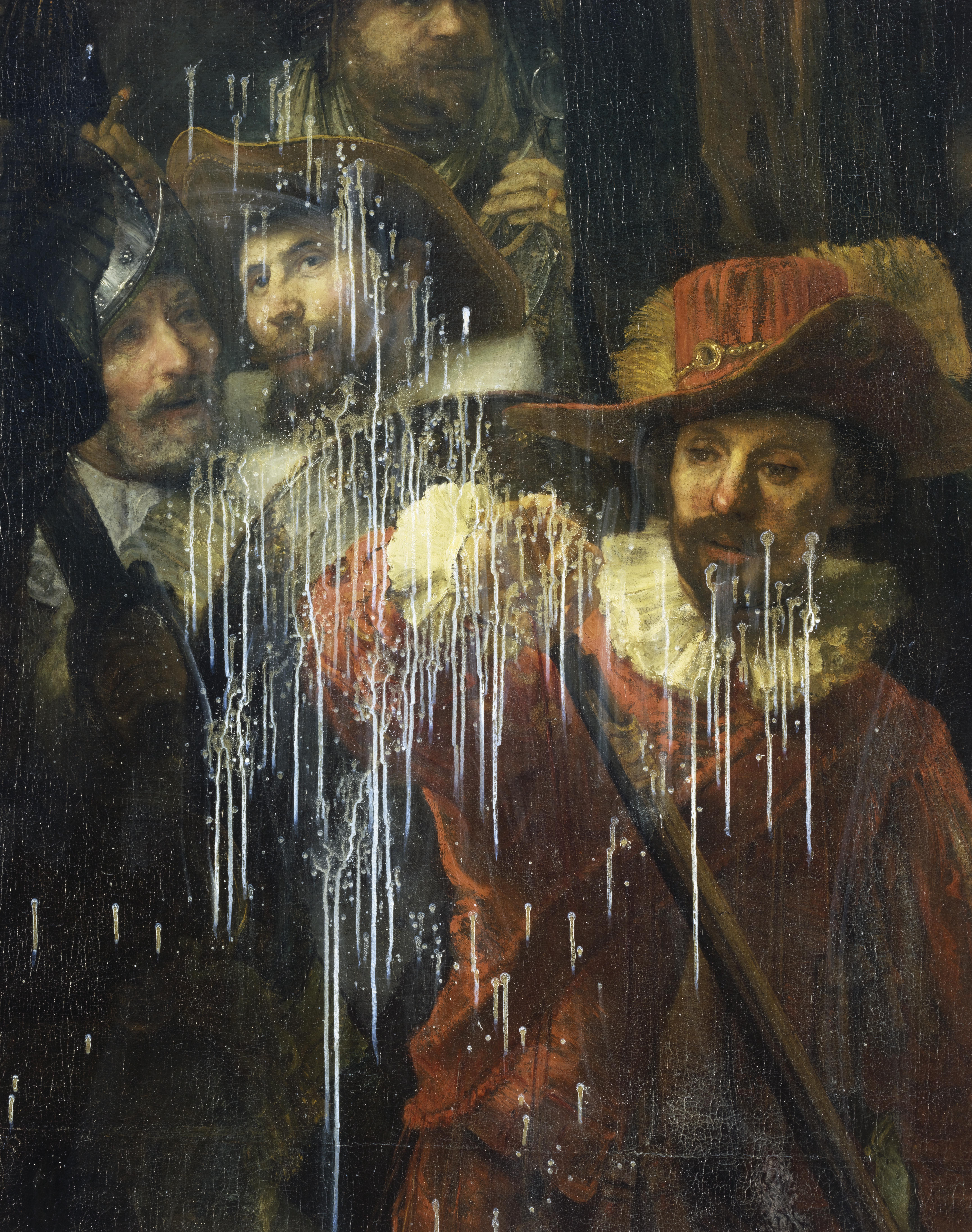 Night Watch damage caused by acid attack